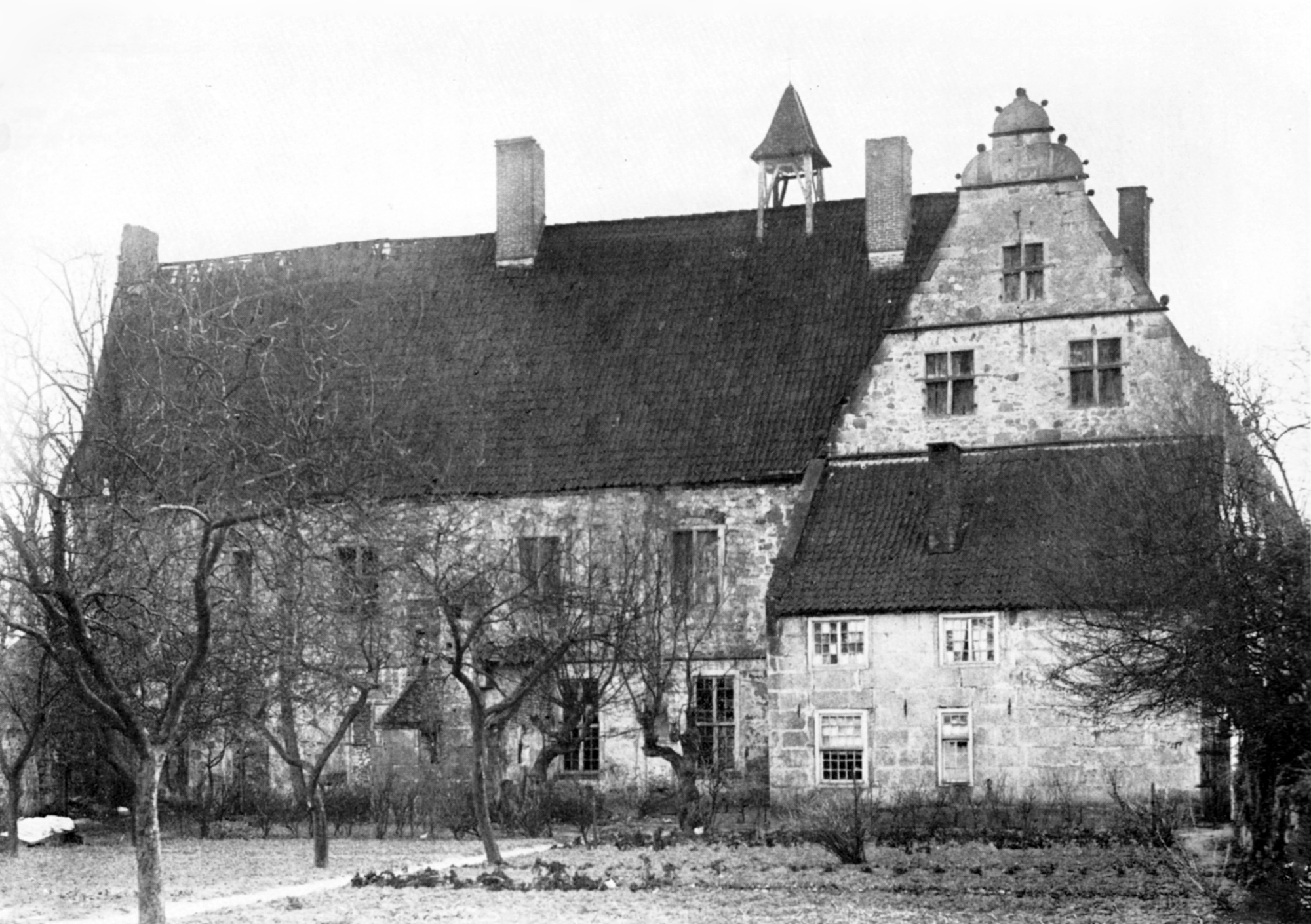 Nordseite der Burg Altena Schüttorf 1903